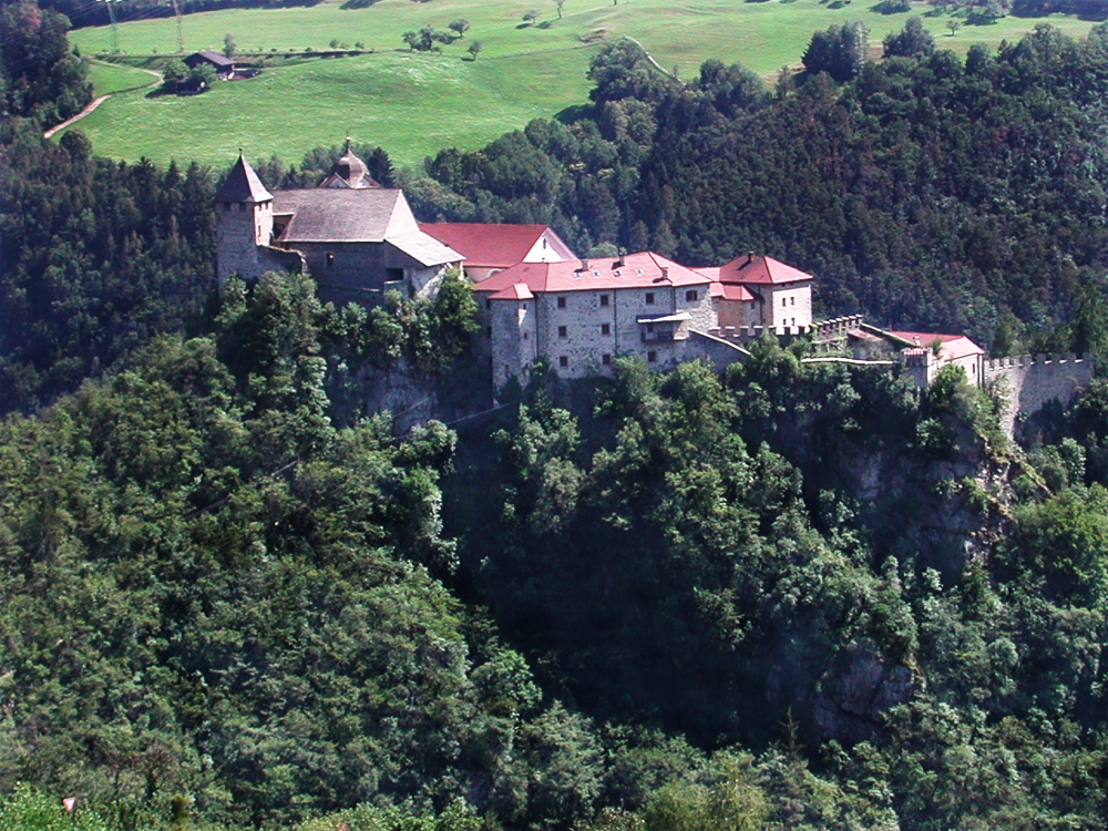 Kloster Säben ober Klausen, Südtirol von Westen: links die Heilig-Kreuz-Kirche, rechts das Benediktinerinnenstift